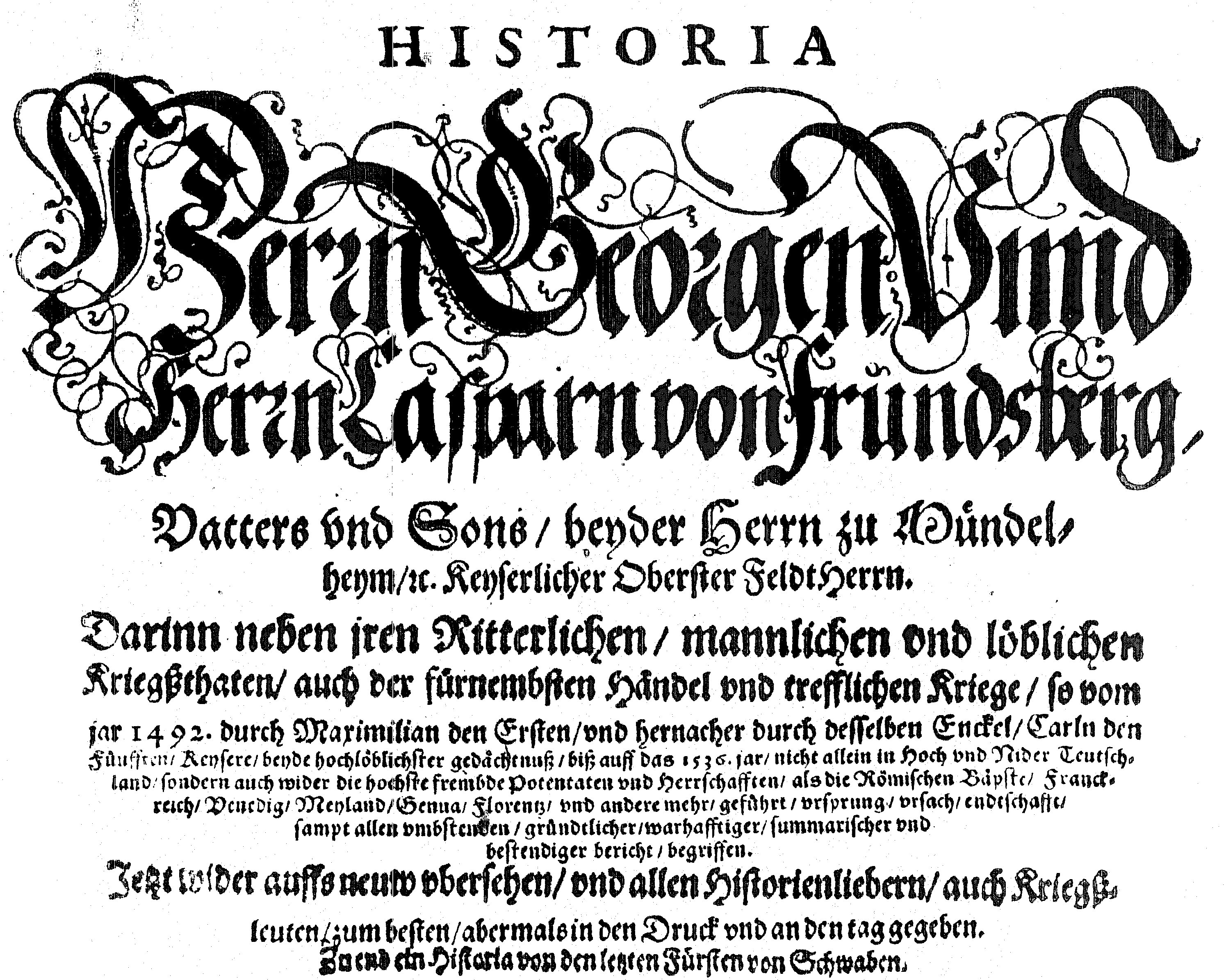 Einleitung der Frundsbergbiographie aus dem Jahr 1572